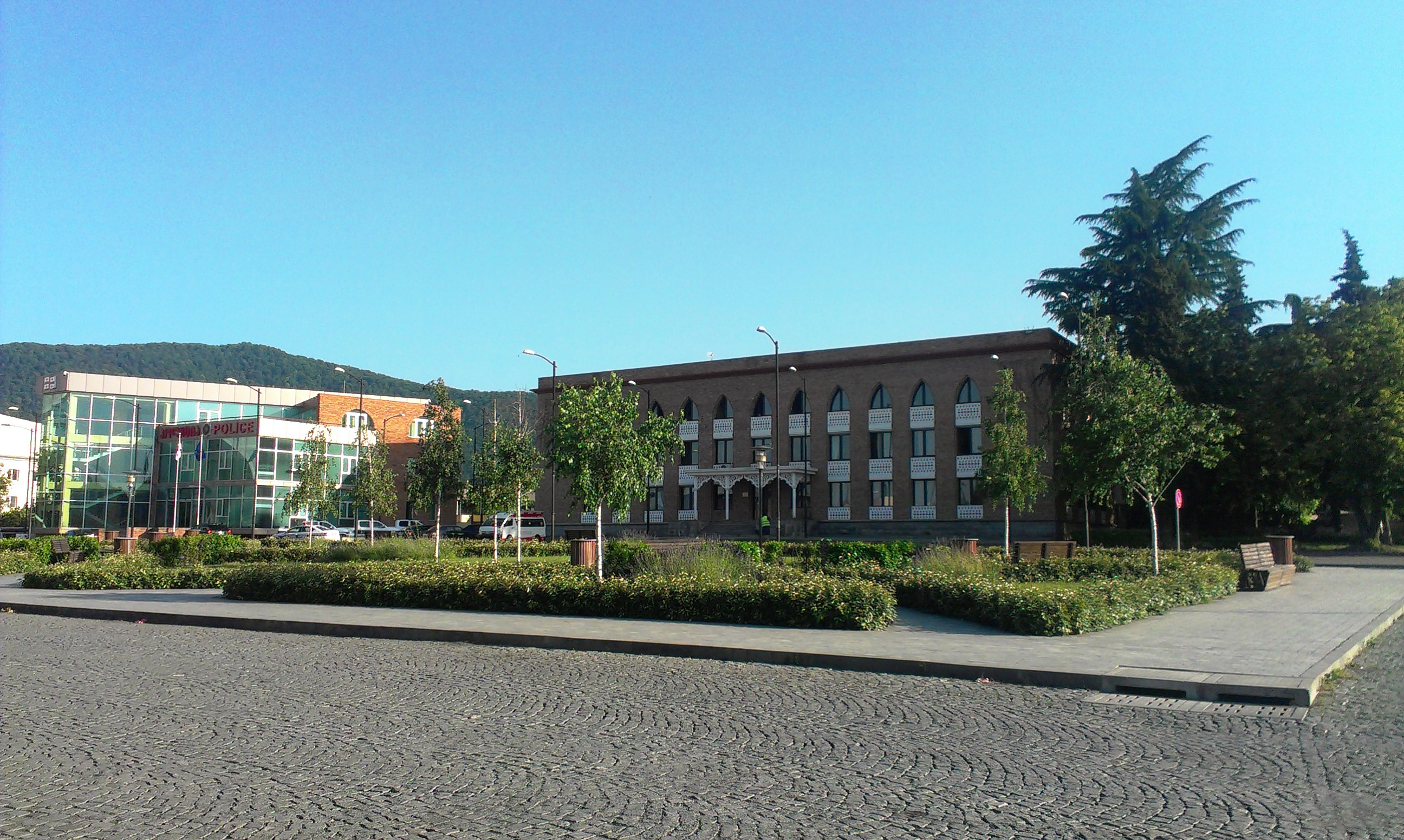 ყვარლის ცენტრი